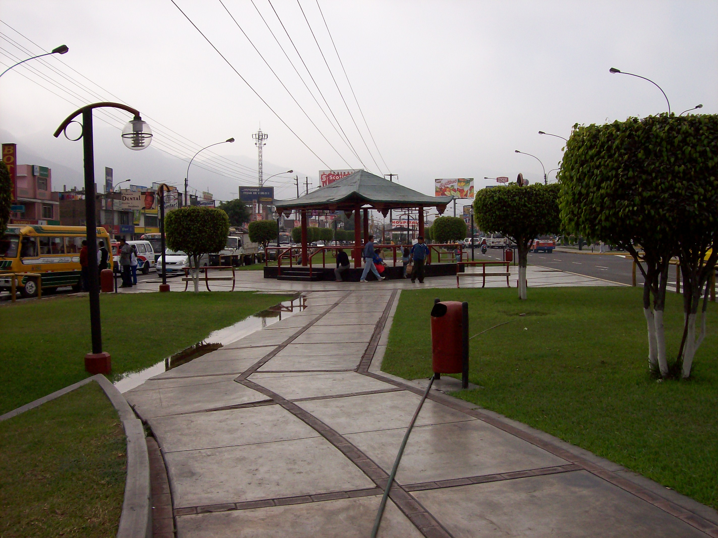 Alameda china, San Juan de Lurigancho, Lima, Perú